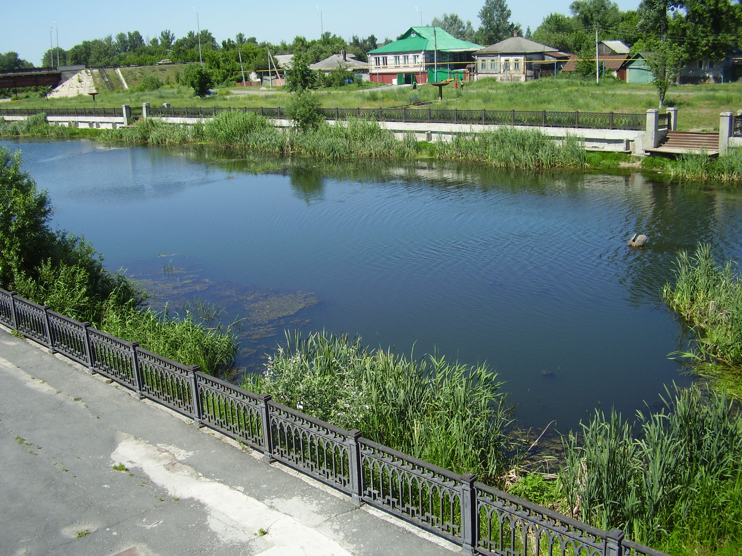 г.Старый Оскол, река Оскол в городе